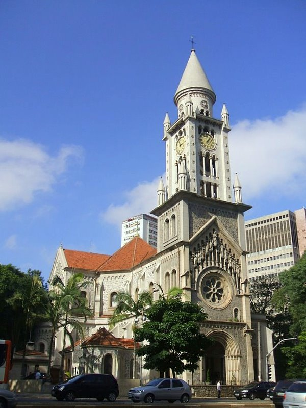 Fachada da Igreja da Consolação, São Paulo, Brasil.